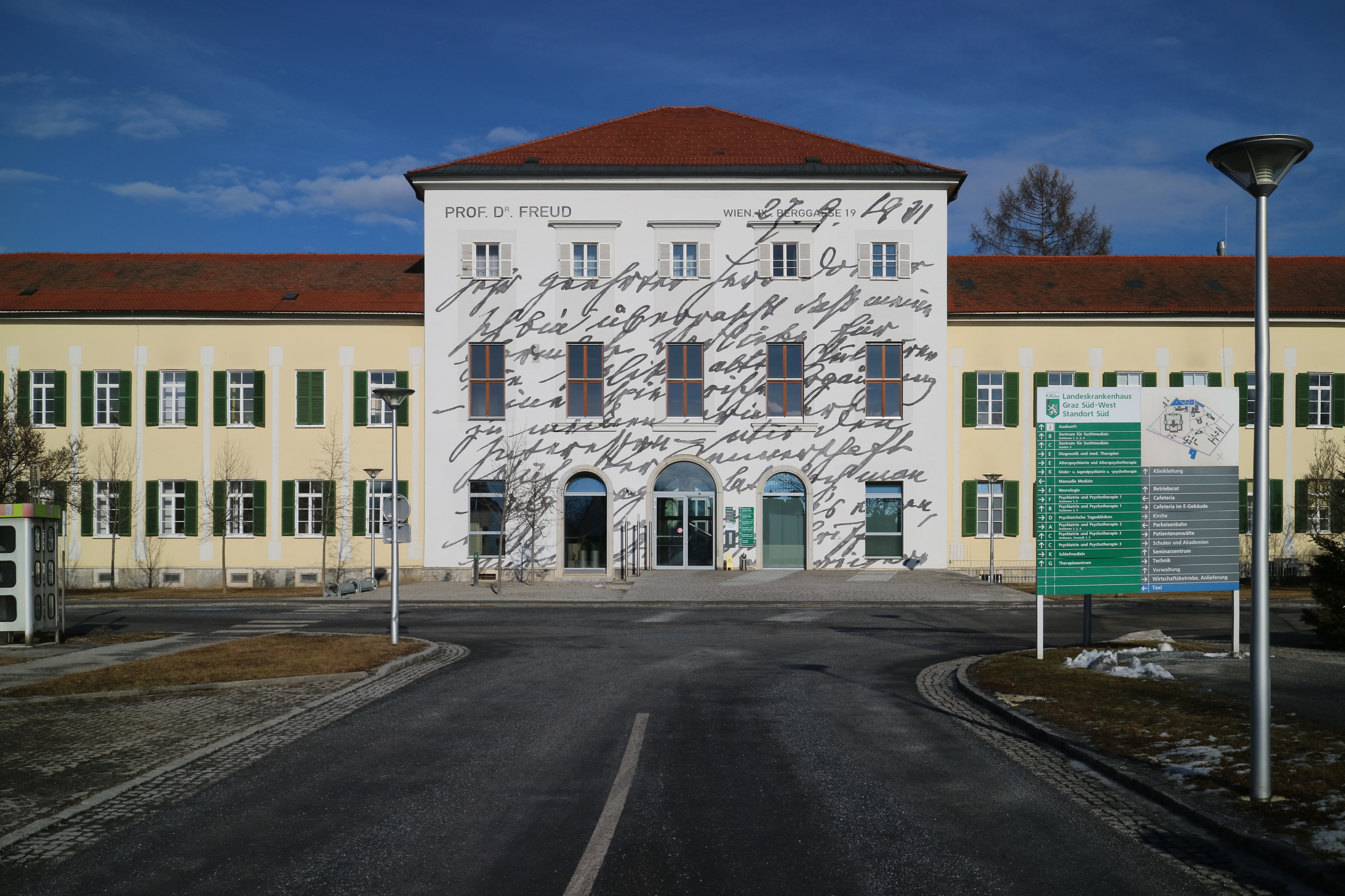 Verwaltungs- und Direktionsgebäude der Landesnervenklinik Sigmund Freud (LKH Graz Süd-West), Wagner-Jauregg-Platz 1